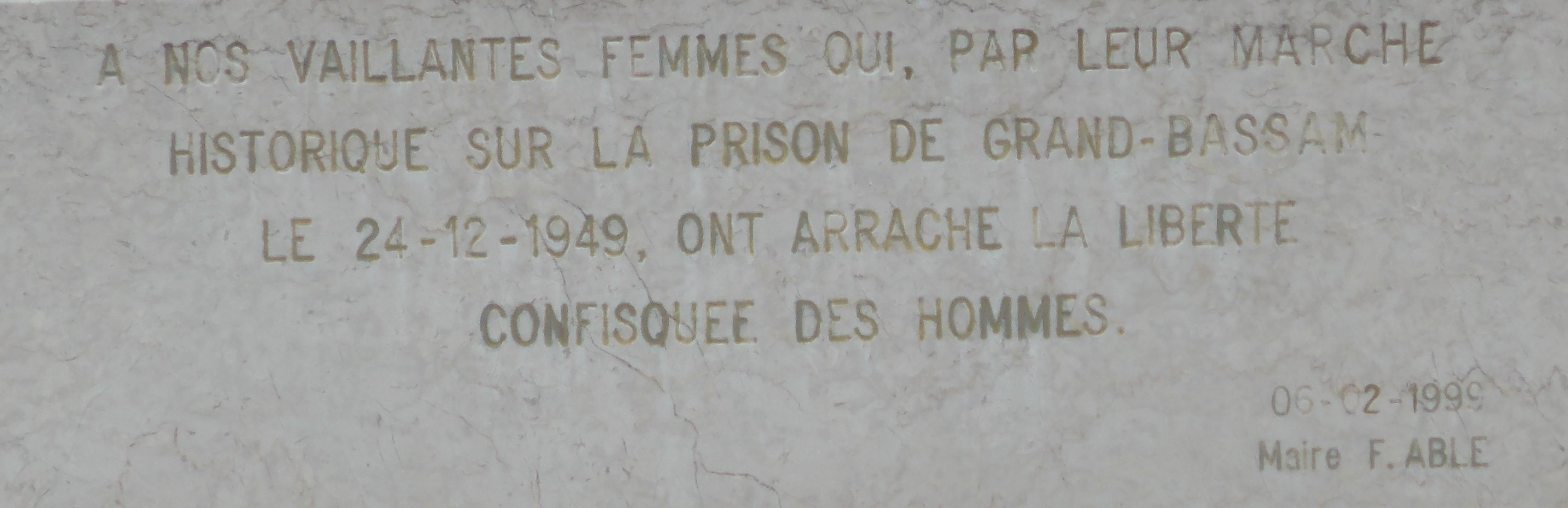 Le 24 août 1949, des femmes marchent sur la prison de Grand-Bassam pour faire libérer leurs époux.